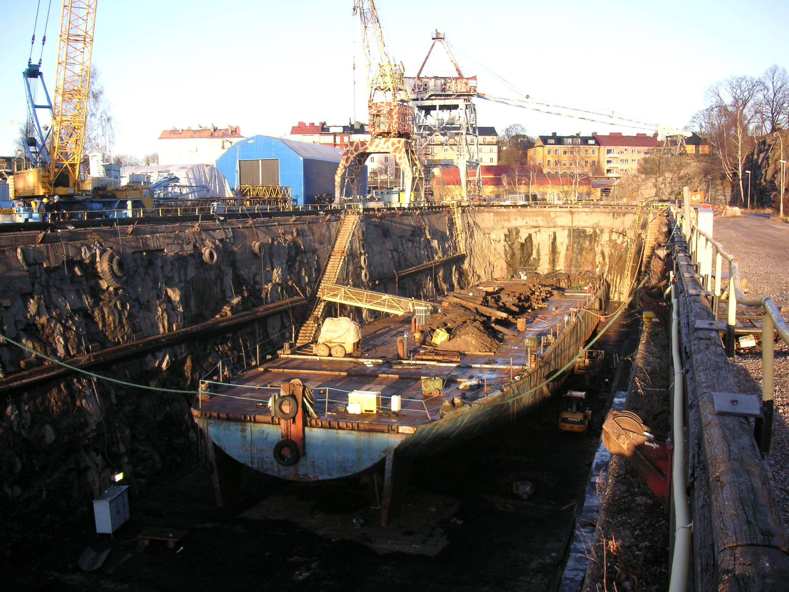 Beckholmen på Djurgården i Stockholm stora torrdockan "Gustav V"